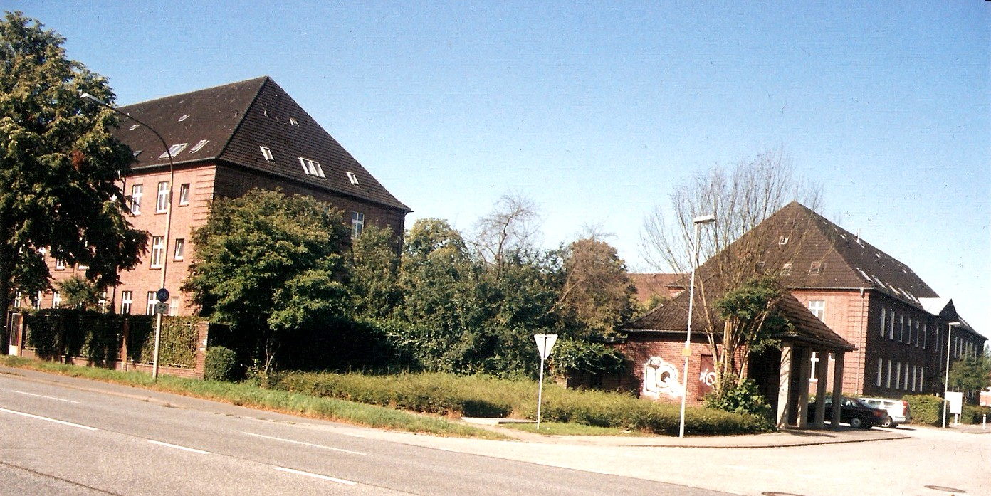 Ehem. Cambrai-Kaserne